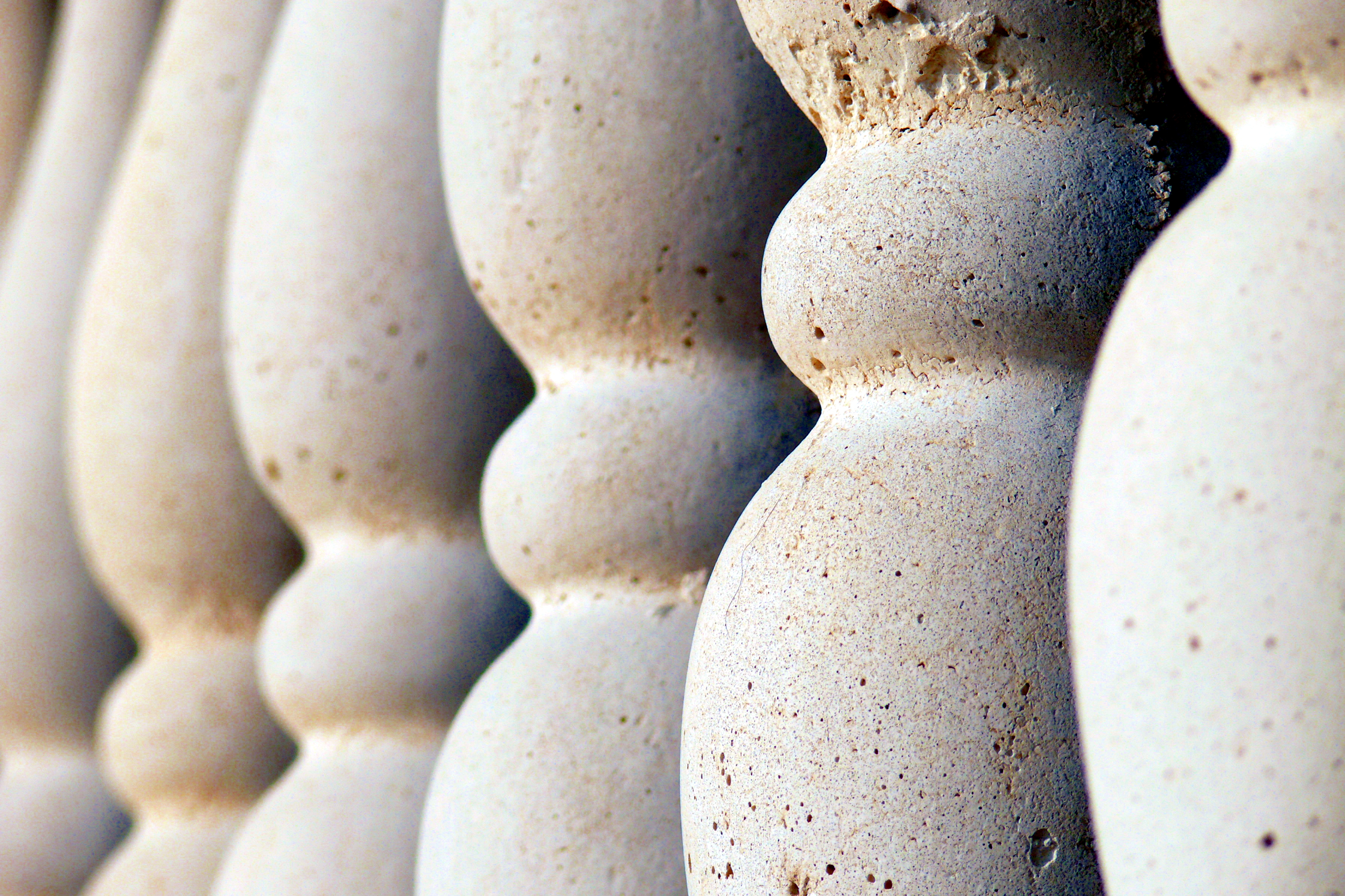 Kalkstein-Balustrade auf der Insel Rab